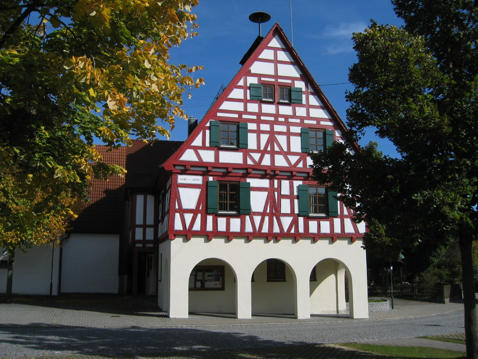 Altheim (Alb), Alb-Donau-Kreis: Rathaus